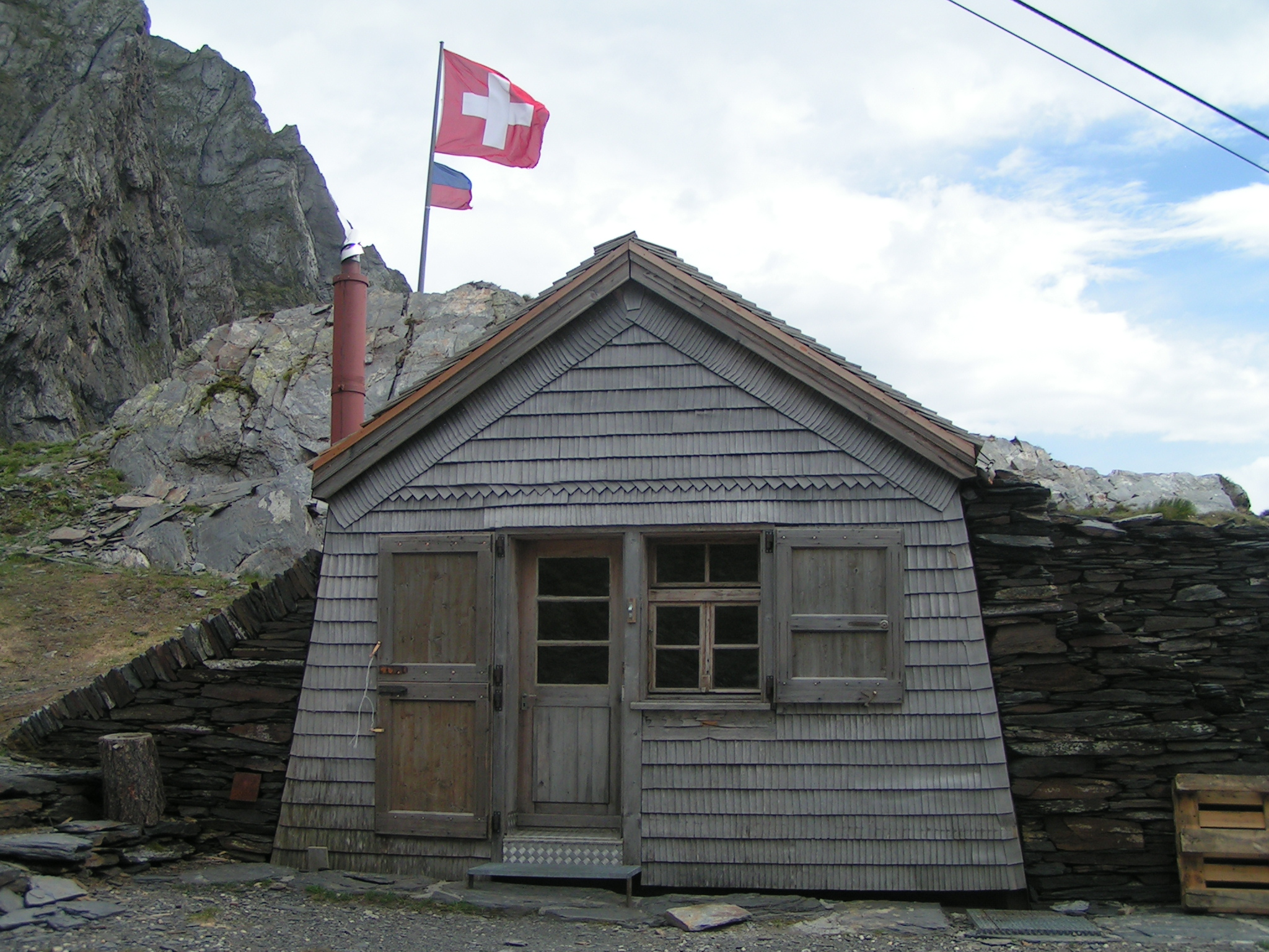 Capanna Scaletta, Ticino, Svizzera - Switzerland